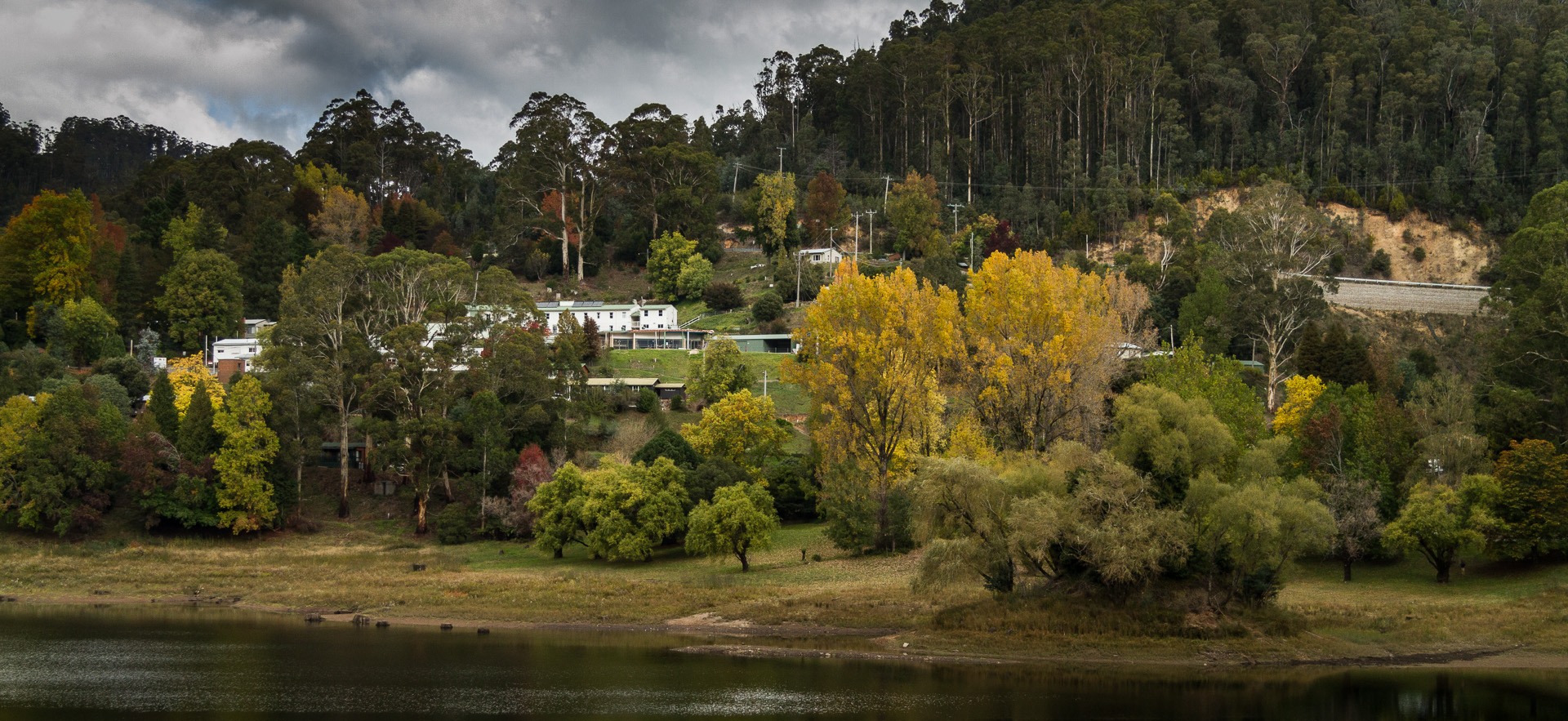 Some autumn colour